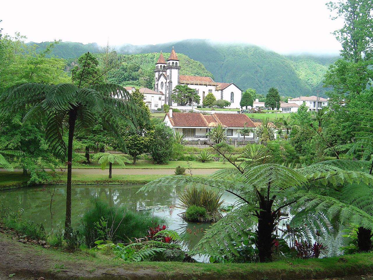 Ilha de S. Miguel